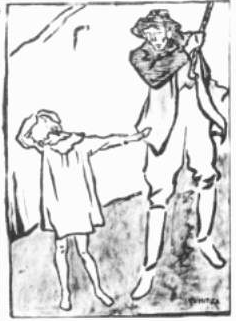 Cartoon by N.Tonitza, published on the cover of Cuvântul Liber newspaper. [Man to child:] "A war orphan and out begging? Mind your rank, you moron!" ([Bărbatul către copil:] "Orfan de război şi cerşeşti? Nu ştii să-ţi ţii rangul, dobitocule!")